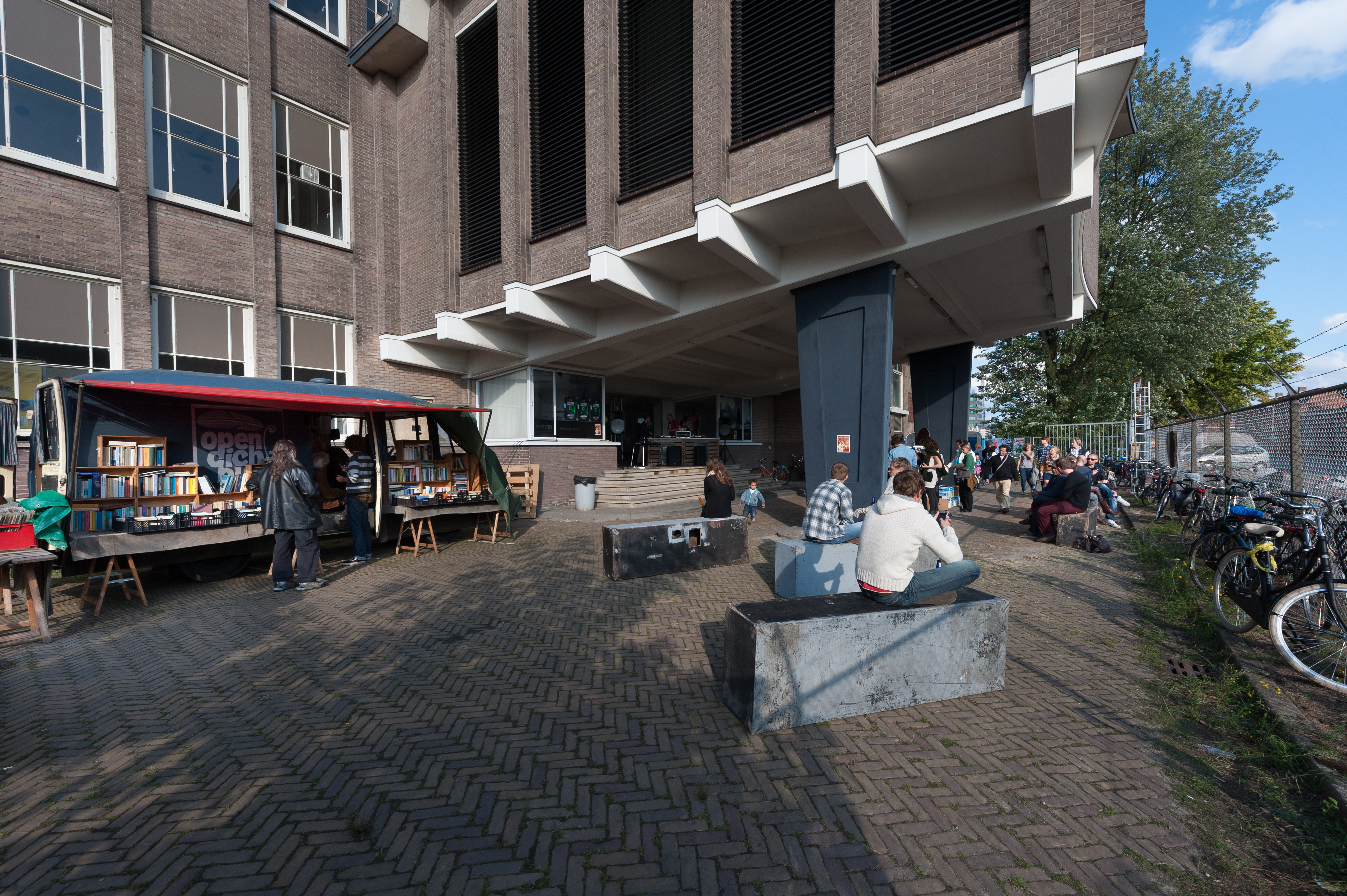 Tot de eigenlijke bouw was er ruimte voor allerlei activiteiten in het NatLab, tijdens het evenement Zimmer Frei.